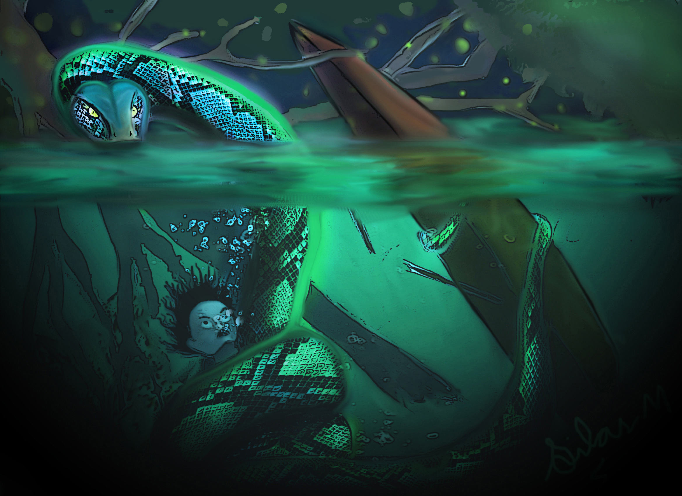 Representação ilustrada mais detalhada do mito do Boitatá